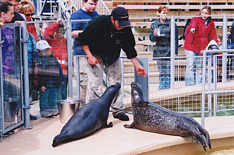 Animation au bassin des phoques communs au Parc Aquarium du Québec (ville de Québec, Québec, Canada); Animation at the common seals at the Parc Aquarium du Québec (Quebec city, Quebec, Canada)